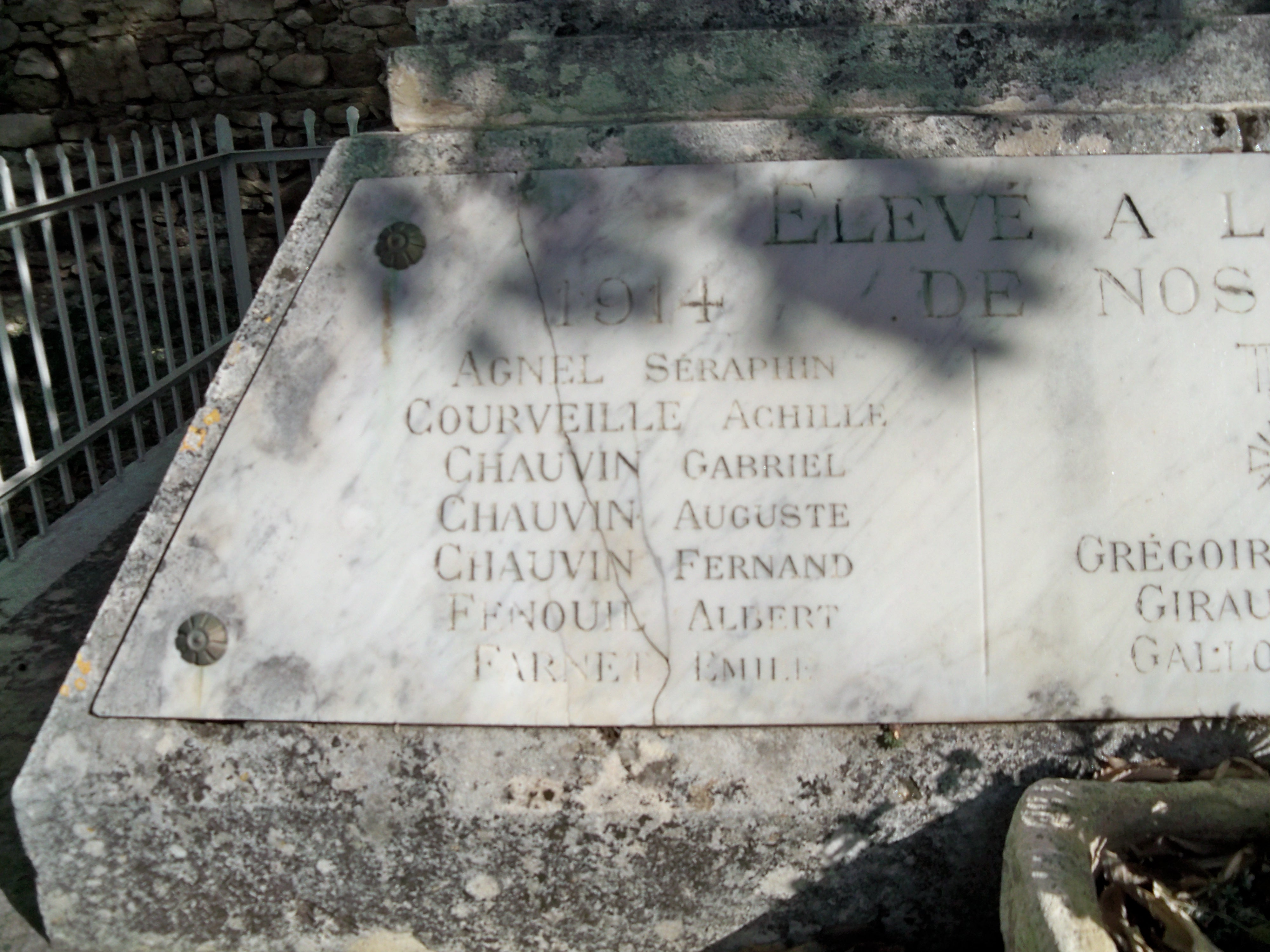 détail monuments aux morts de Rustrel